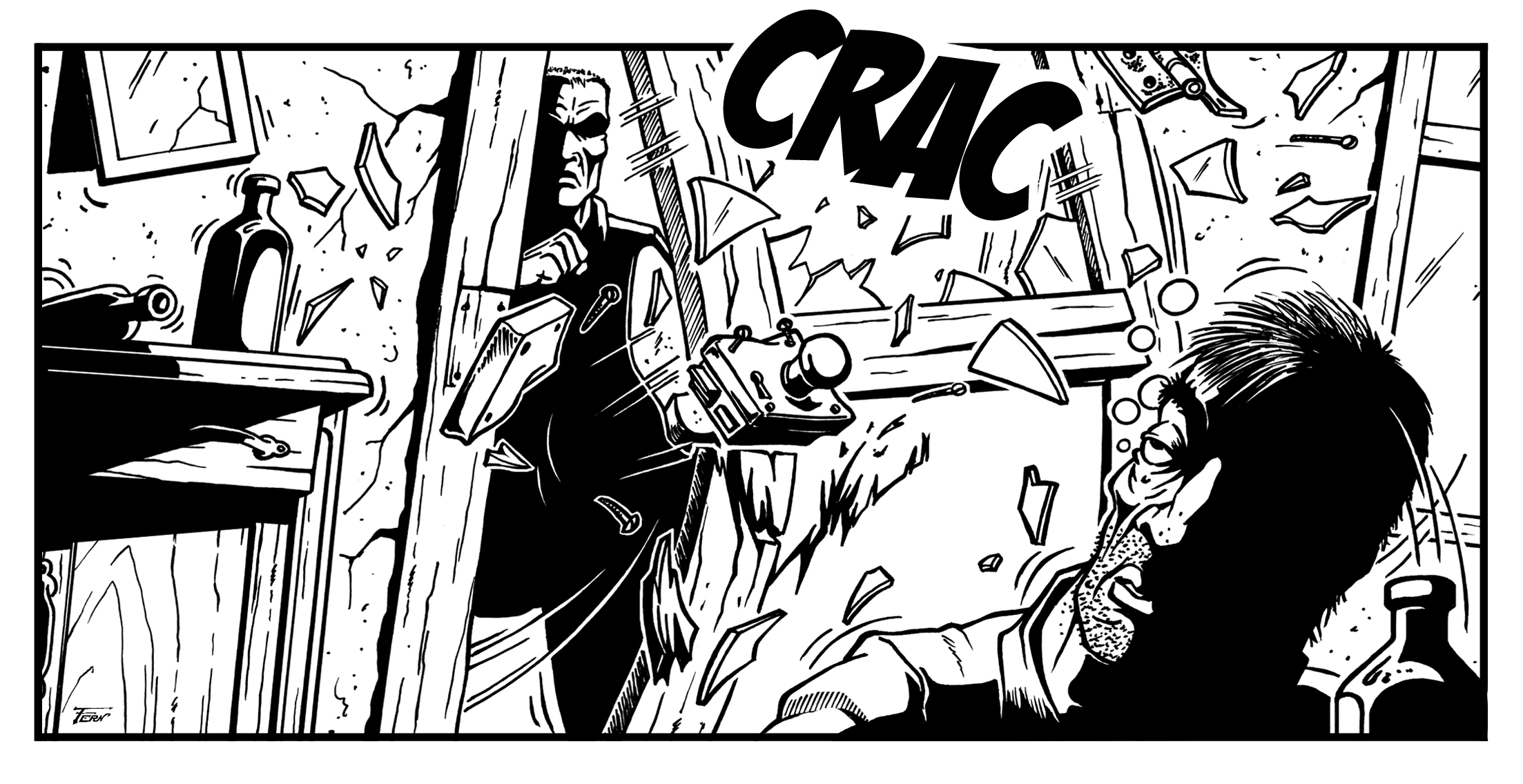 "CRAC" Onomatopee vum Fern Weirich